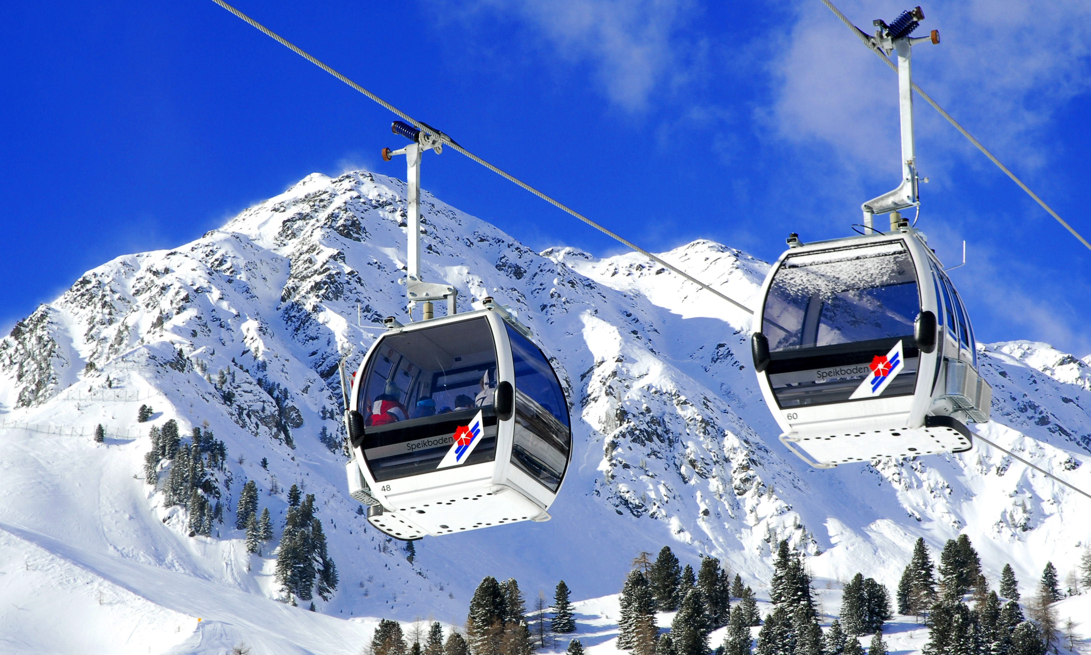 Kabinen der Anlage "Speikboden" mit Bergen im Hintergrund